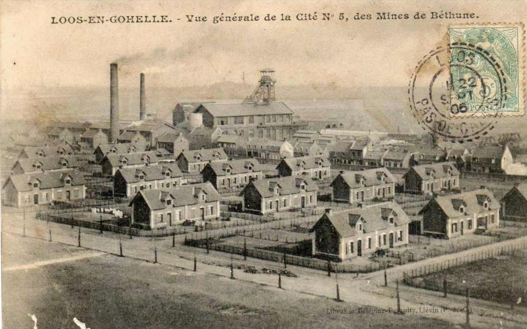 La fosse n° 5 - 5 bis de la Compagnie des mines de Béthune était un charbonnage constitué de deux puits situé à Loos-en-Gohelle, Pas-de-Calais, Nord-Pas-de-Calais, France.